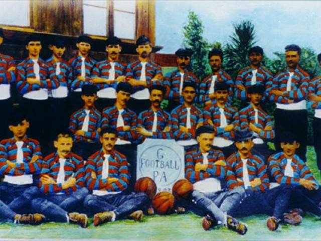 Formação inicial do time gremiste em dezembro de 1903